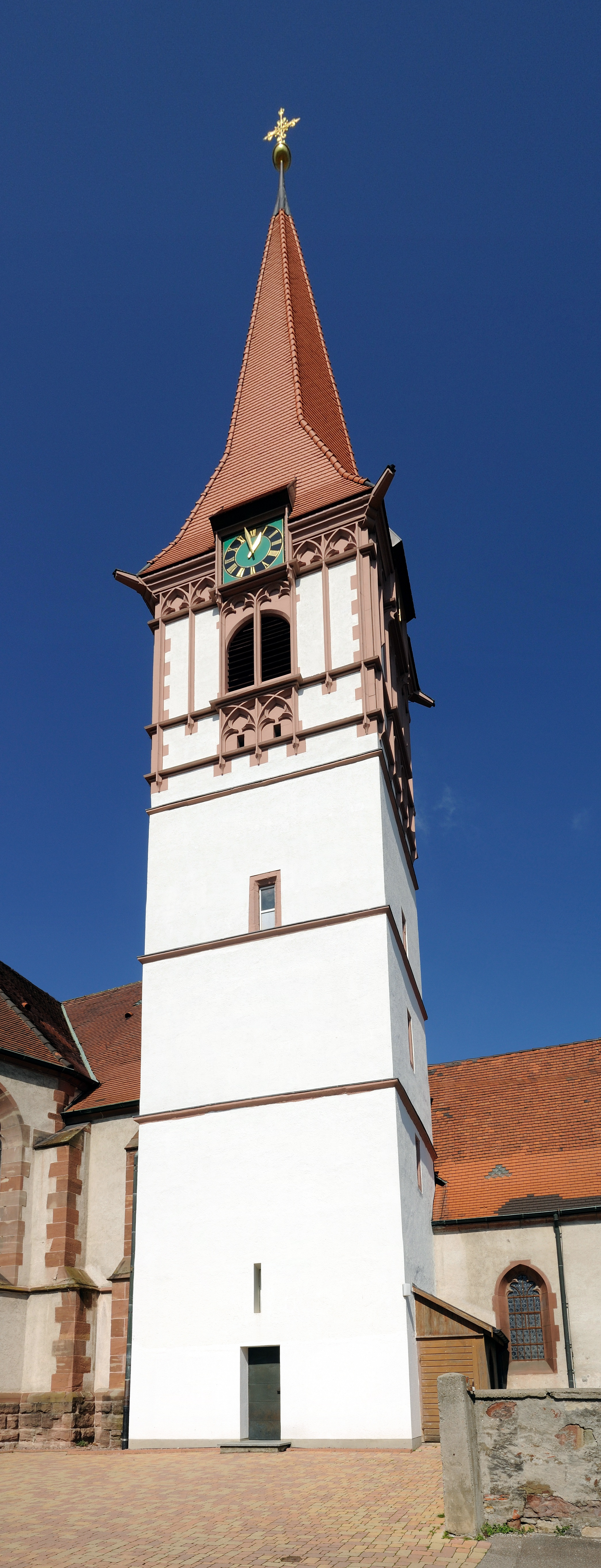 Wyhlen: Georgskirche, Gesamtansicht des Glockenturms